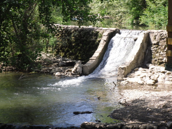 Брана на Неродимки